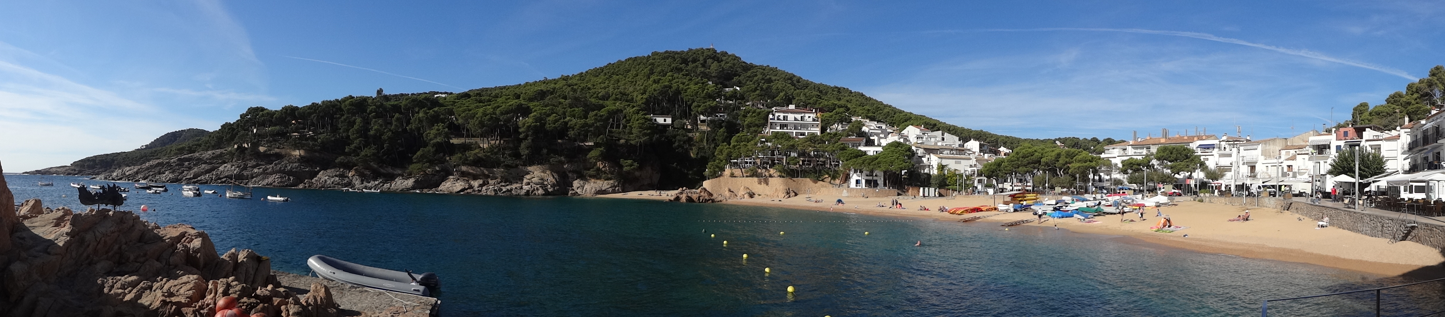 Platja de Tamariu (Palafrugell) This is a a photo of a beach in Catalonia, Spain, with id: PL-CT-17003-184